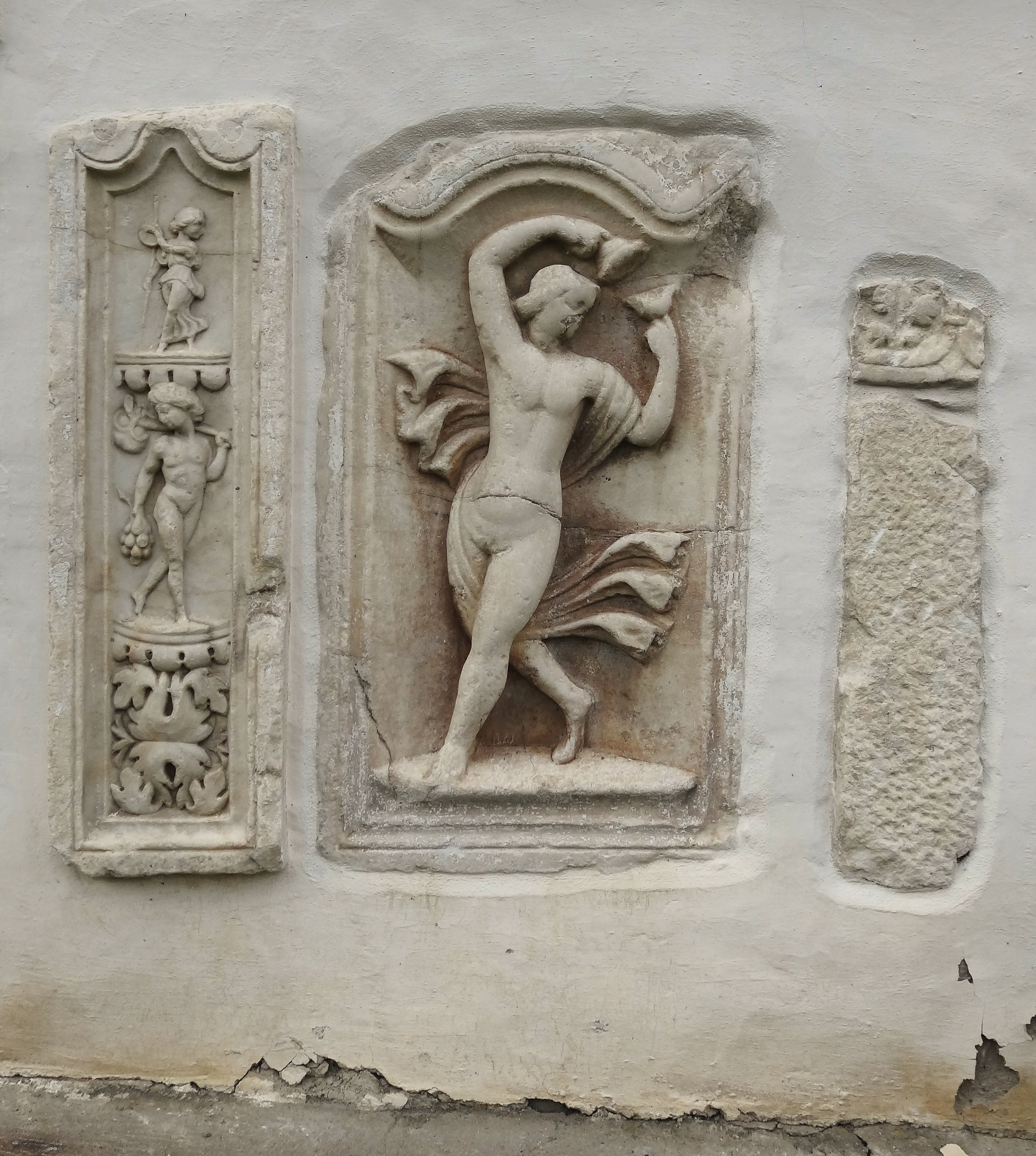 Römersteine in der Südwand der kath. Pfarrkirche Hl. Jakobus d. Ä. (Tiffen), in der Mitte eine tanzende Mänade